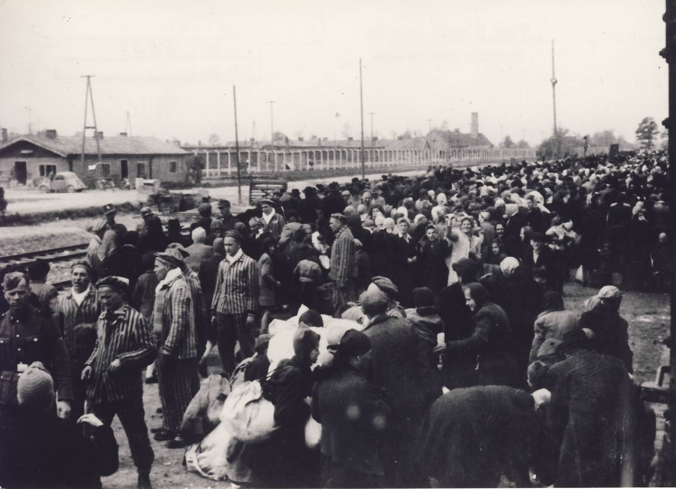 Mnoho z nich nedostalo možnost svůj příběh vyprávět. Dopřejme sluchu těm, kteří ano.